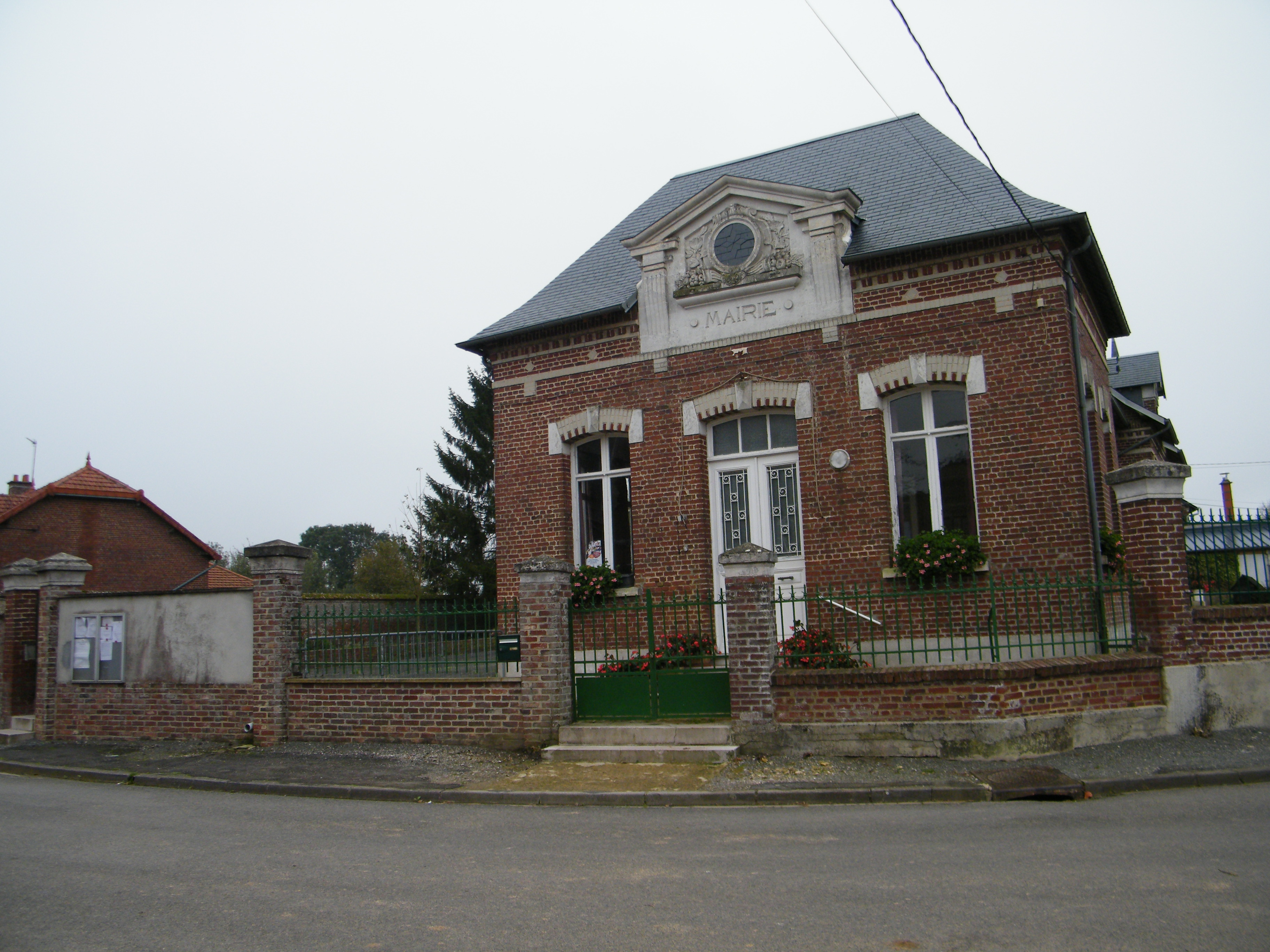 Bâtiments communaux : la mairie.